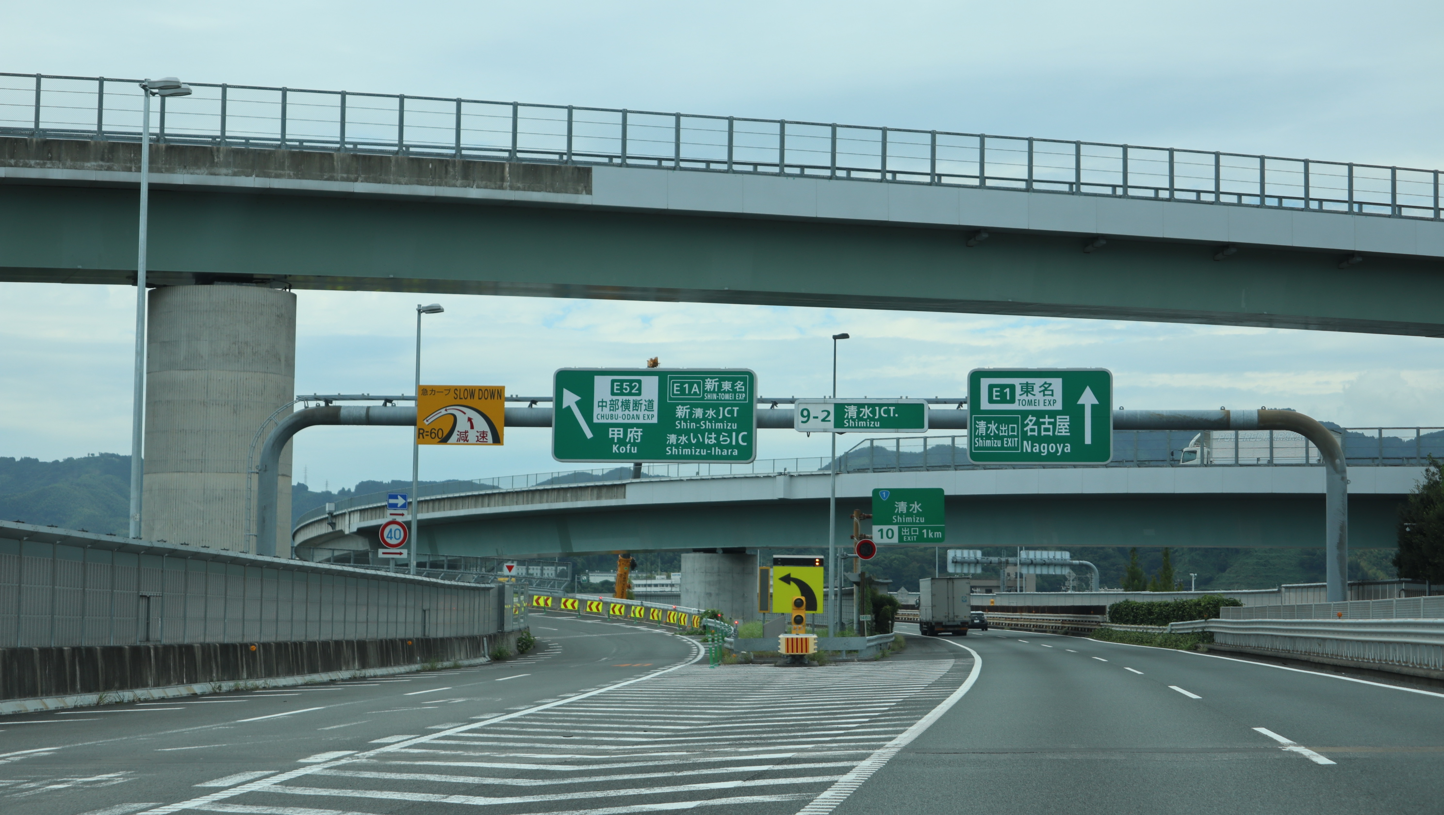 清水ジャンクション